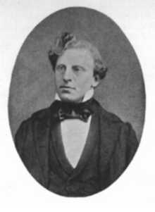 Fotografi af mæcenen Carl Andreas Ancker ((13. september 1828 i København - 16. november 1857))